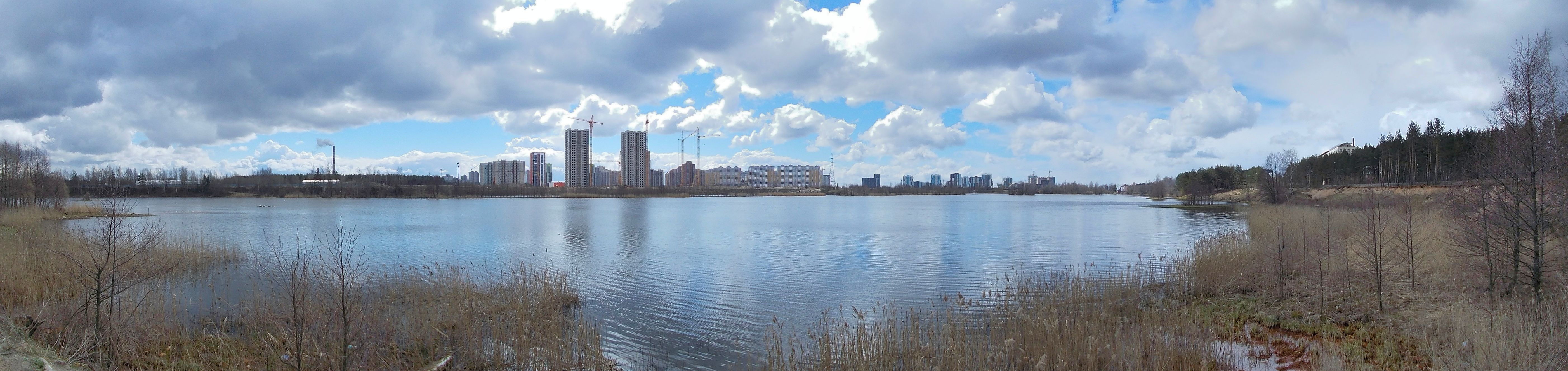 Панорама Шуваловского карьера